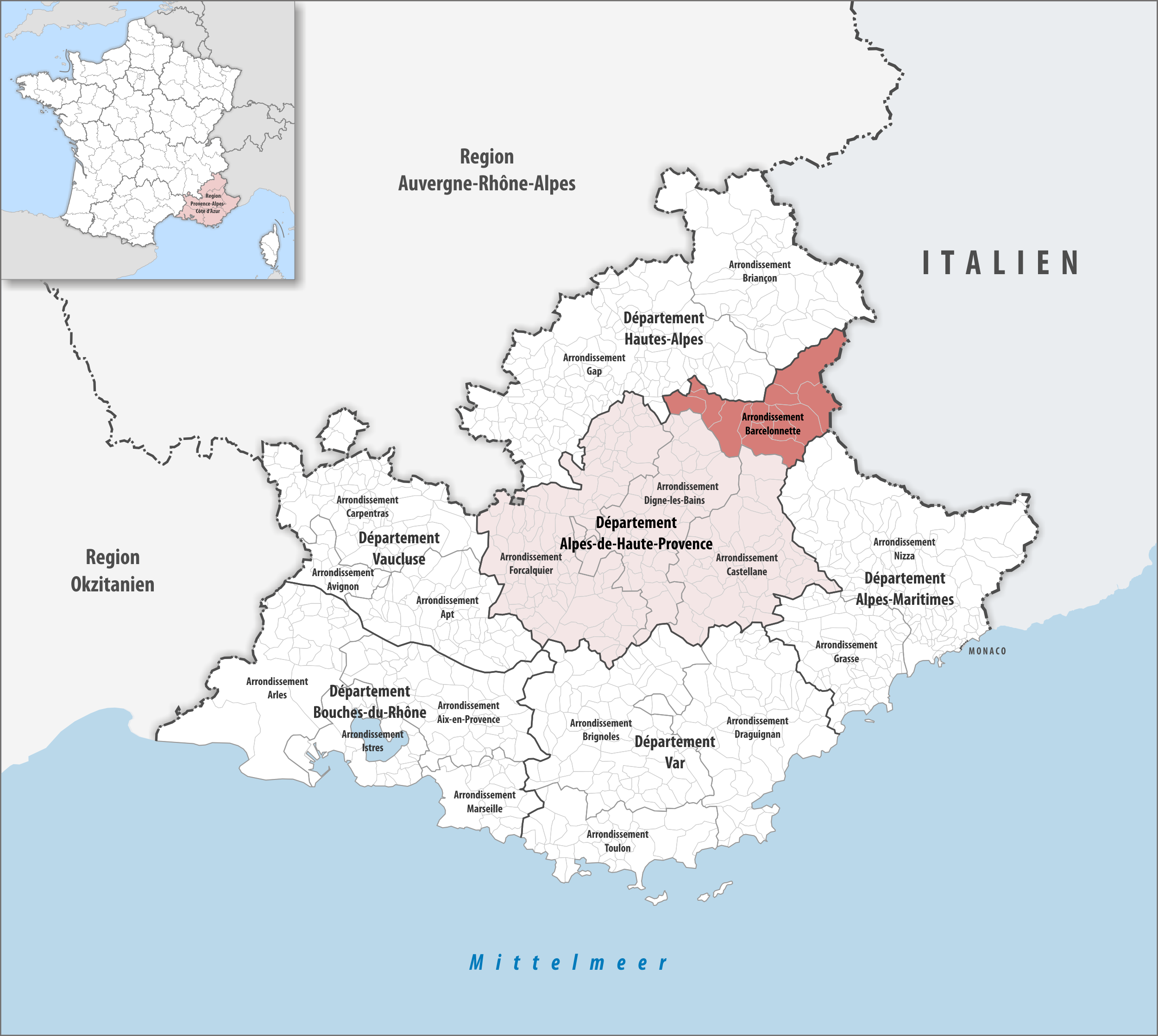 Lage des Arrondissements Barcelonnette